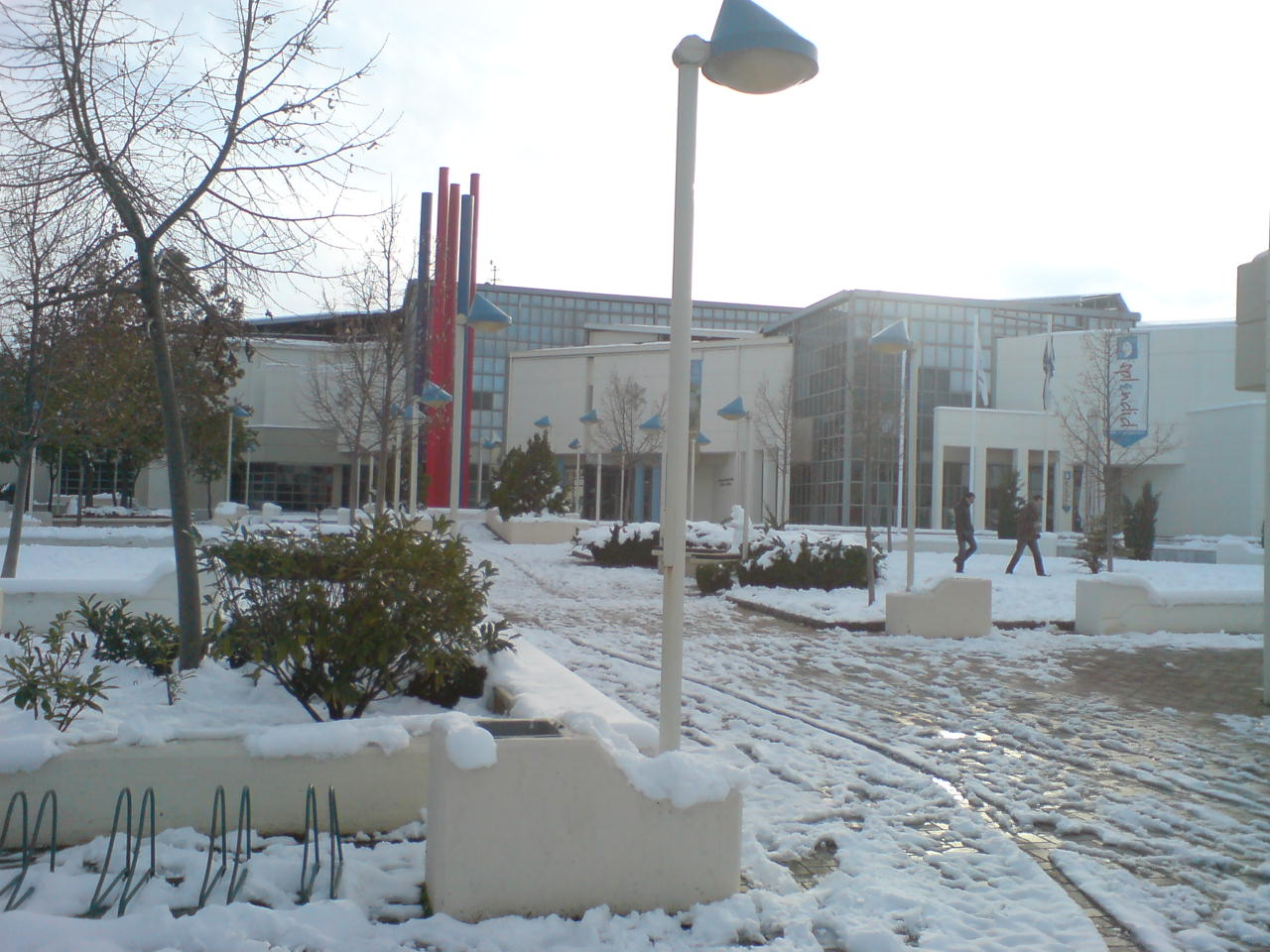 Η Δημοτική Πινακοθήκη Λάρισας μια χειμωνιάτικη μέρα